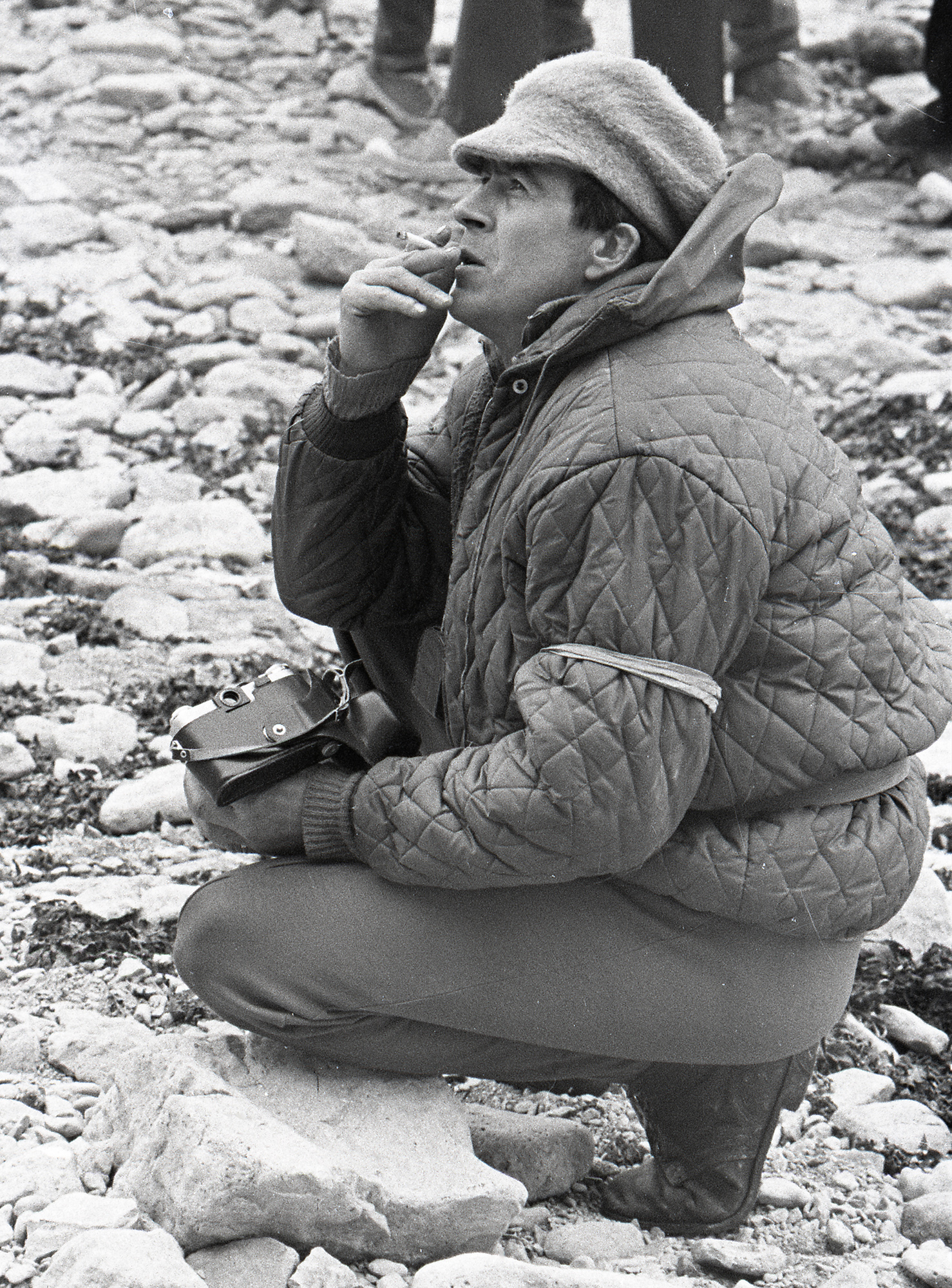 Ragnar Palmre